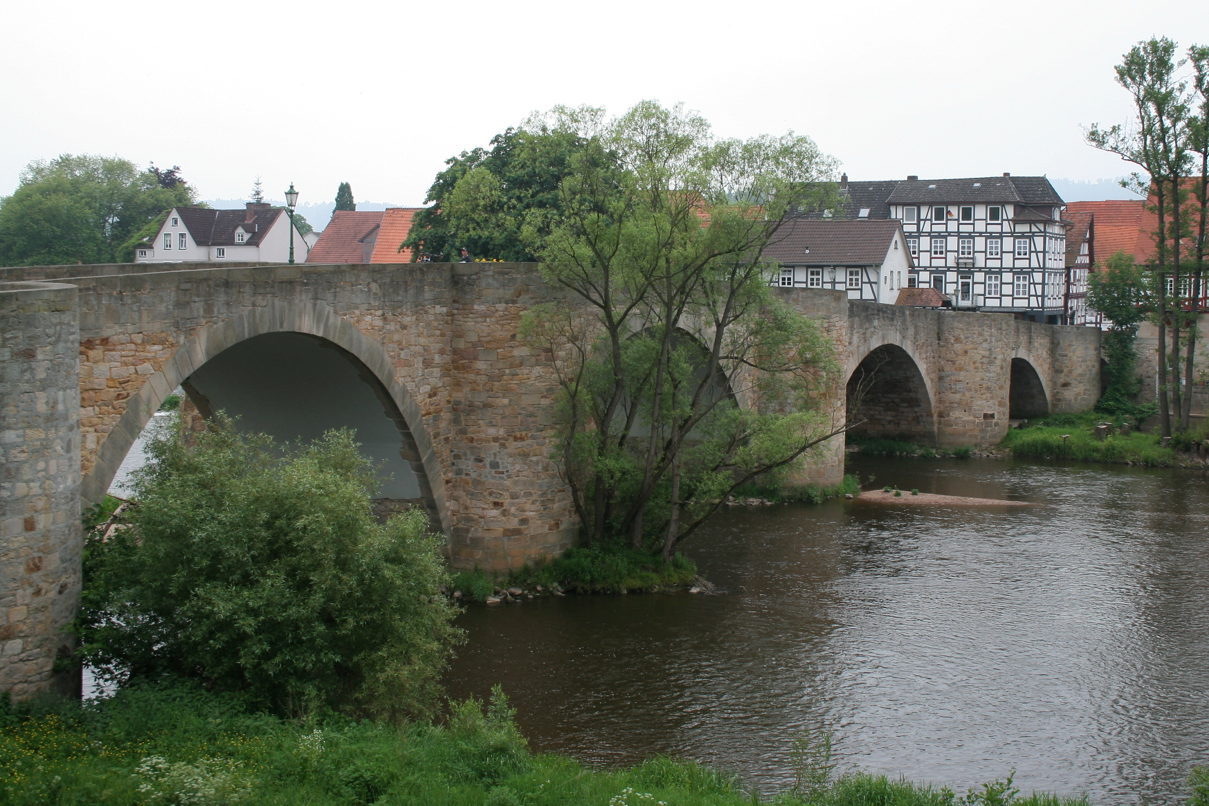 Bartenwetzerbrücke (erbaut 1595/1596) in Melsungen.